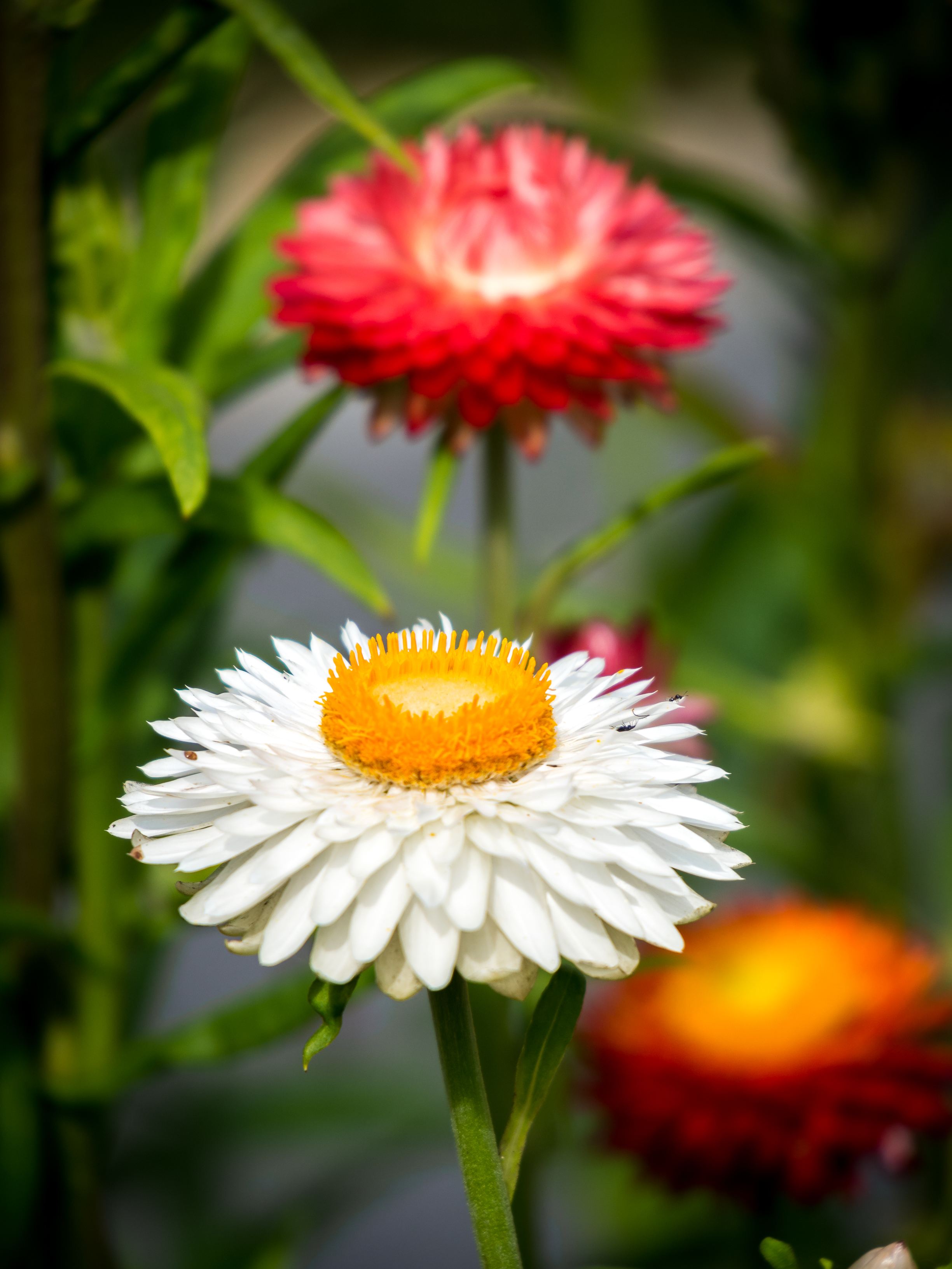 Die Garten-Strohblume (Xerochrysum bracteatum, Helichrysum bracteatum, Bracteantha bracteata)